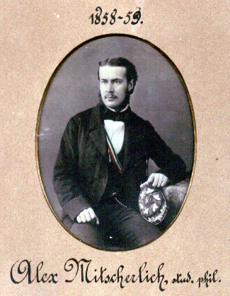 Alexander Mitscherlich als Student in Göttingen, Aufnahme von 1858. Quelle: Archiv der Burschenschaft Hannovera